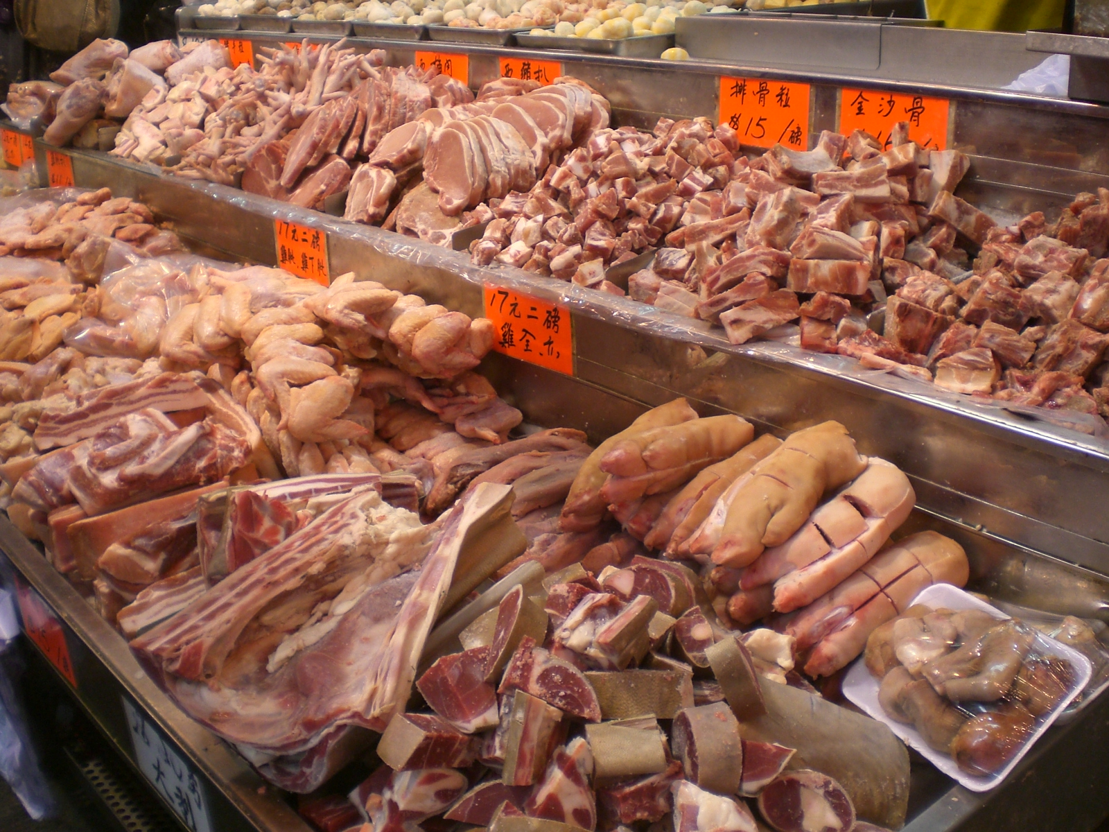 觀塘瑞和街街市凍肉